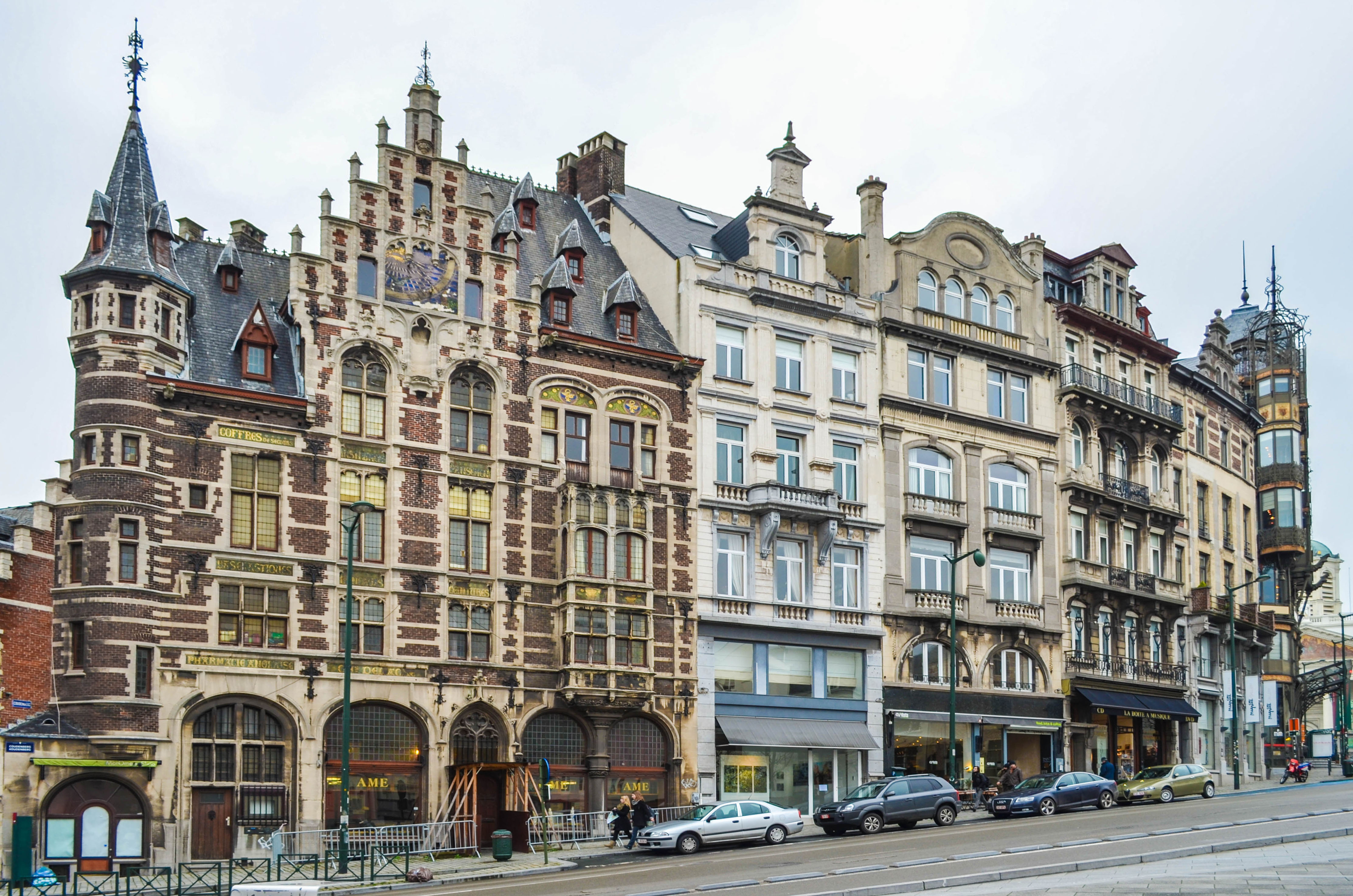 Bruxelles, rue Montagne de la Cour : la Pharmacie Delacre (à gauche), par Paul Saintenoy (1895). À droite, l’immeuble Old England (1898-1899).